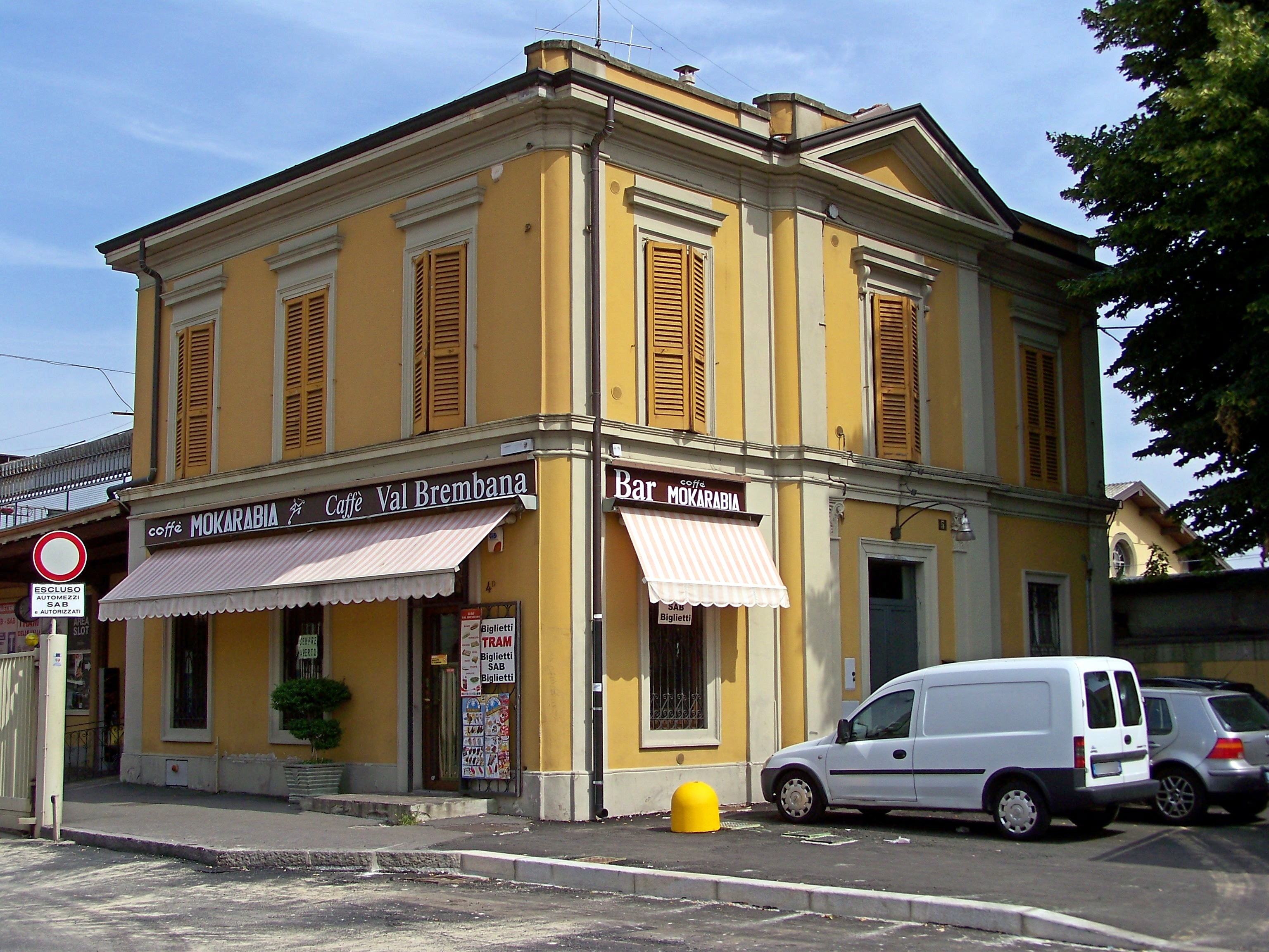 Il fabbricato viaggiatori della stazione di Bergamo della Ferrovia della Val Seriana.